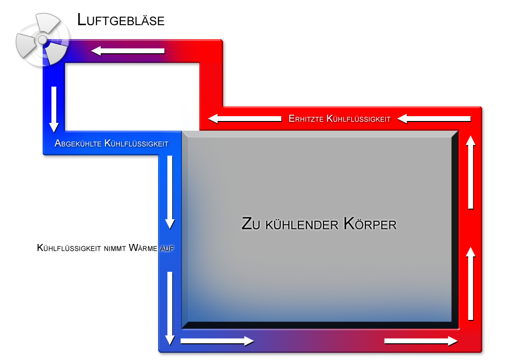 Funktionsweise einer Wasserkühlung (water cooling) *Beschreibung: Funktionsweise einer Wasserkühlung *Quelle: „selbst gezeichnet *Zeichner: --Sjr 13:28, 22. Mai 2005 (CEST) *Andere Versionen: (Bild:Wasserkühlung.jpg)